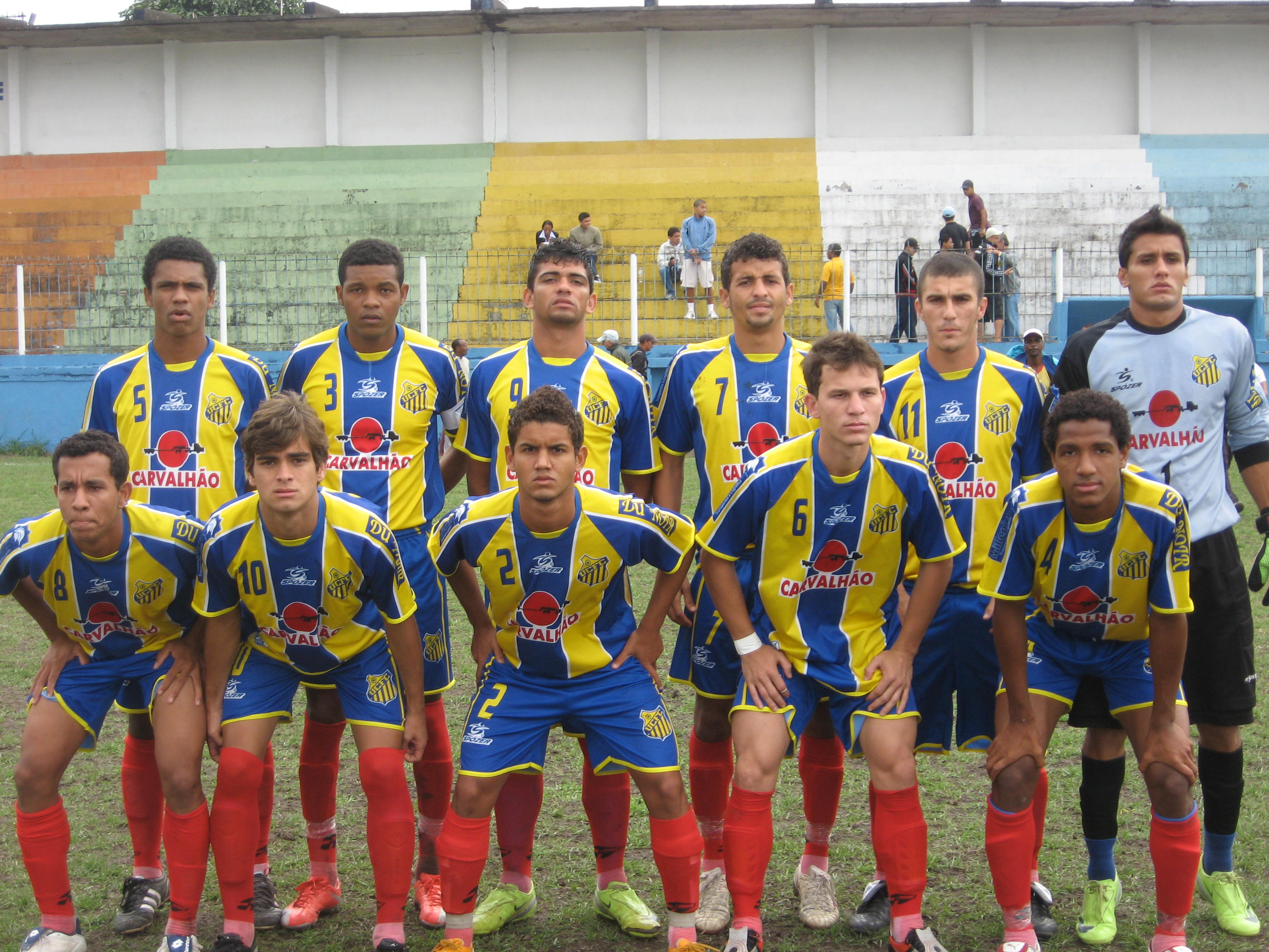 Equipe do União Central Futebol Clube em 2009 perfilada